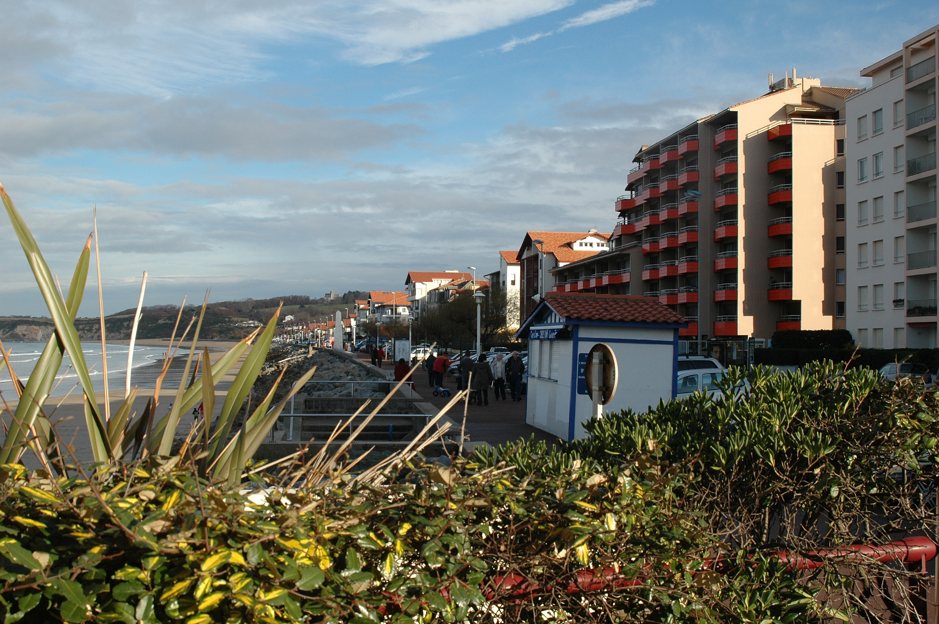 Hendaye, la plage. Photo prise le 06/01/07 par Harrieta171